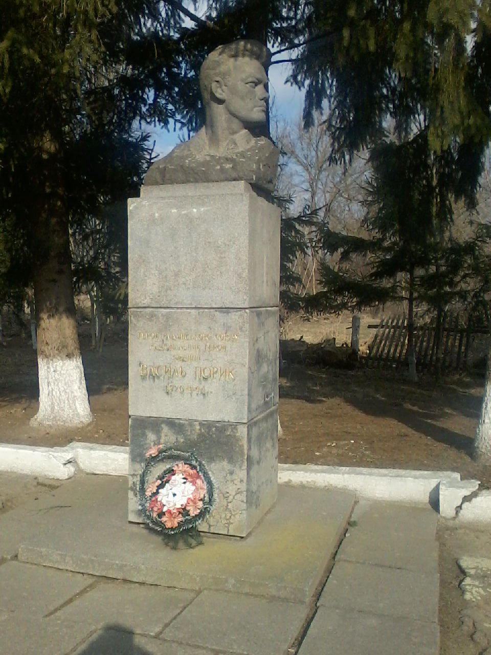 Пам'ятник Василю Порику. Село Порик Вінницької області.